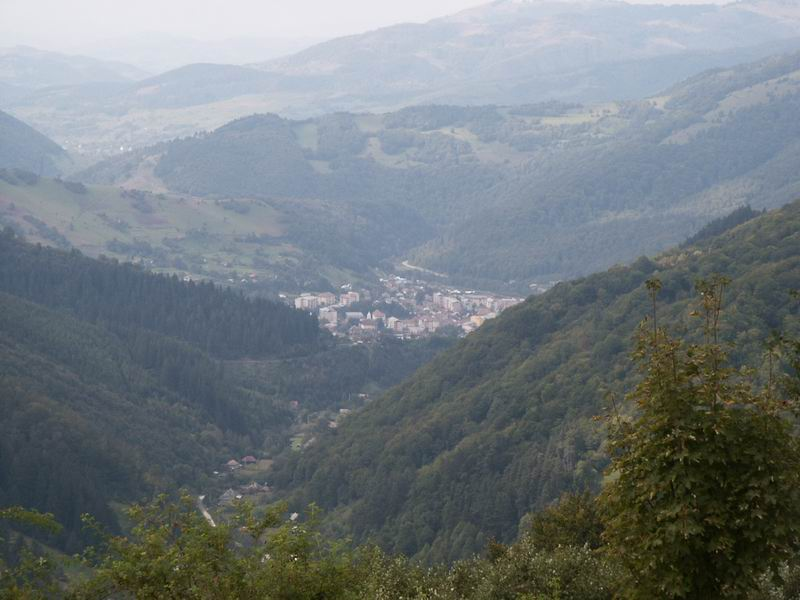 Baia de Arieş